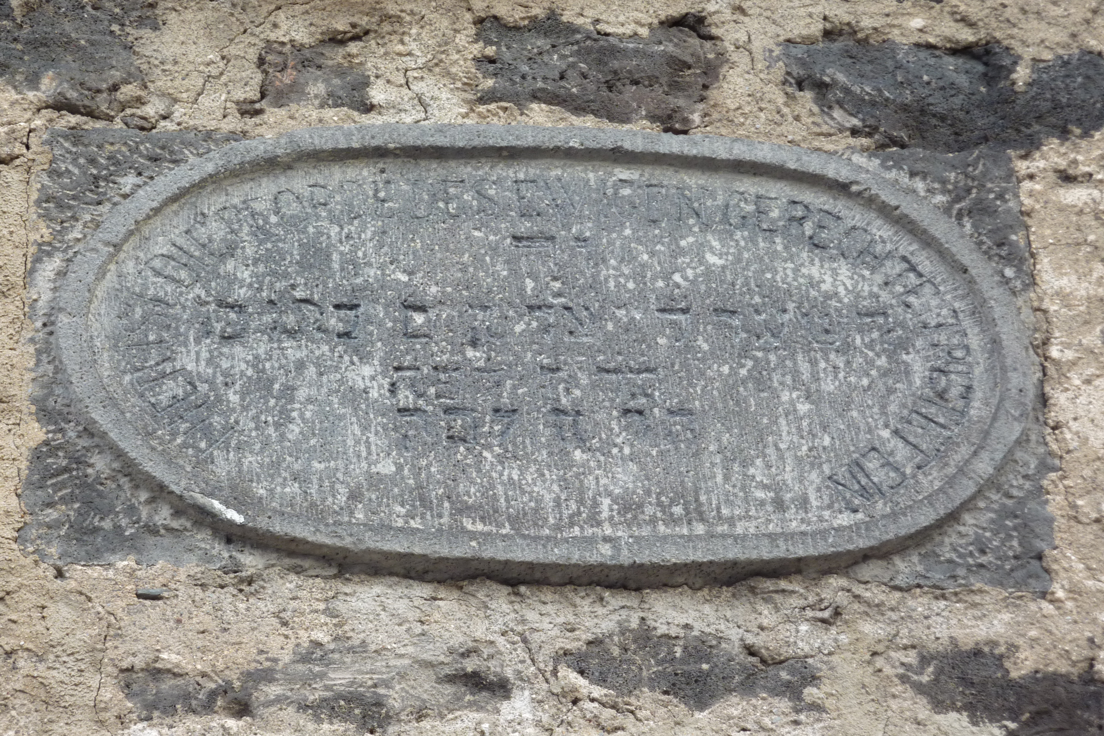 Synagoge Saffig, Inschriftentafel an der Hauptfassade